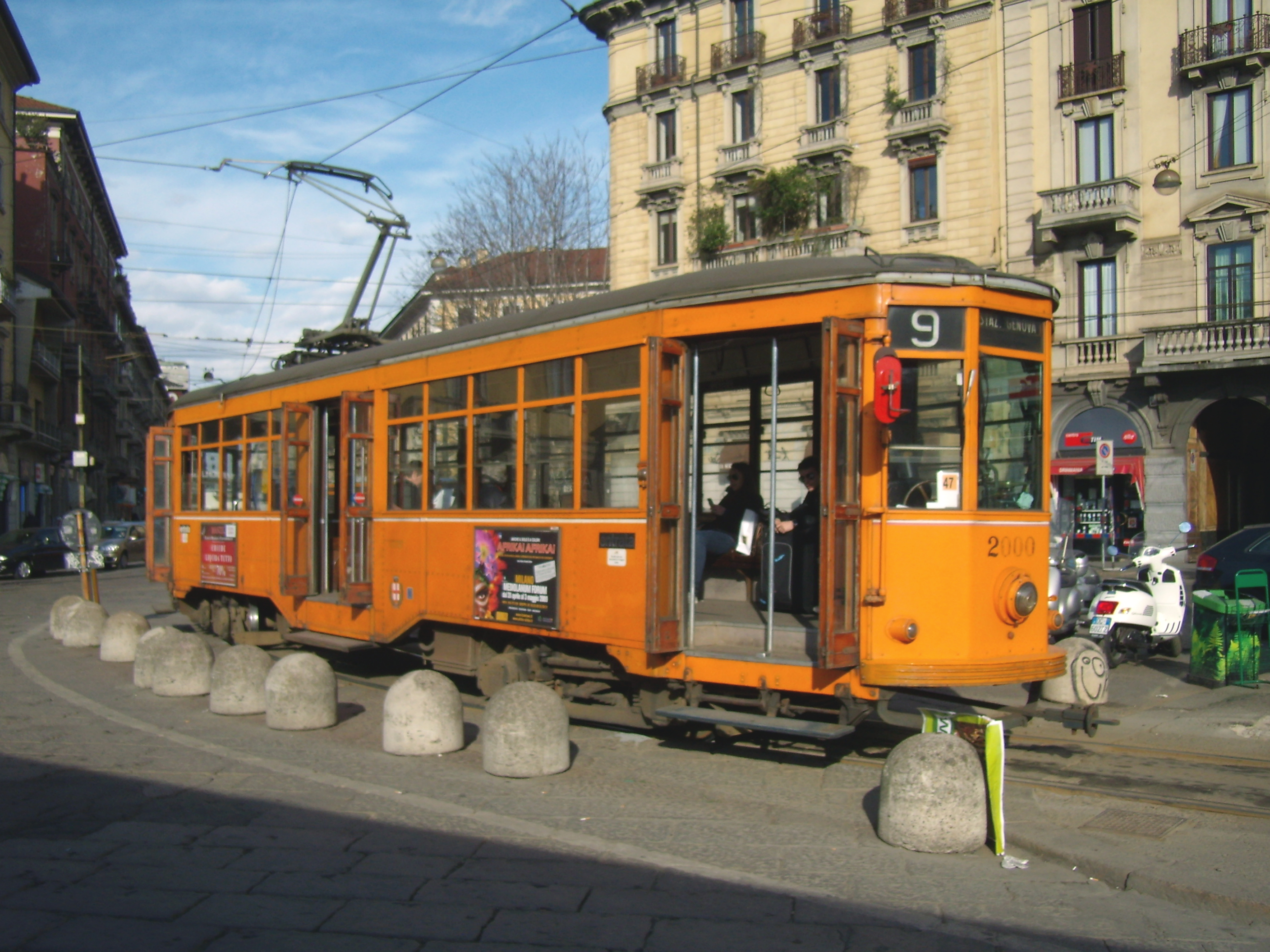 Capolinea della linea 9 della rete tranviaria di Milano in piazzale Stazione Genova. È in sosta una vettura della serie 1500 (detta "carrelli" o "tipo 1928")